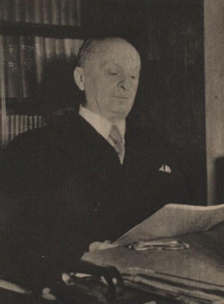 Theodor Nussbaum (1880-1965), český soudce a prezident Nejvyššího soudu